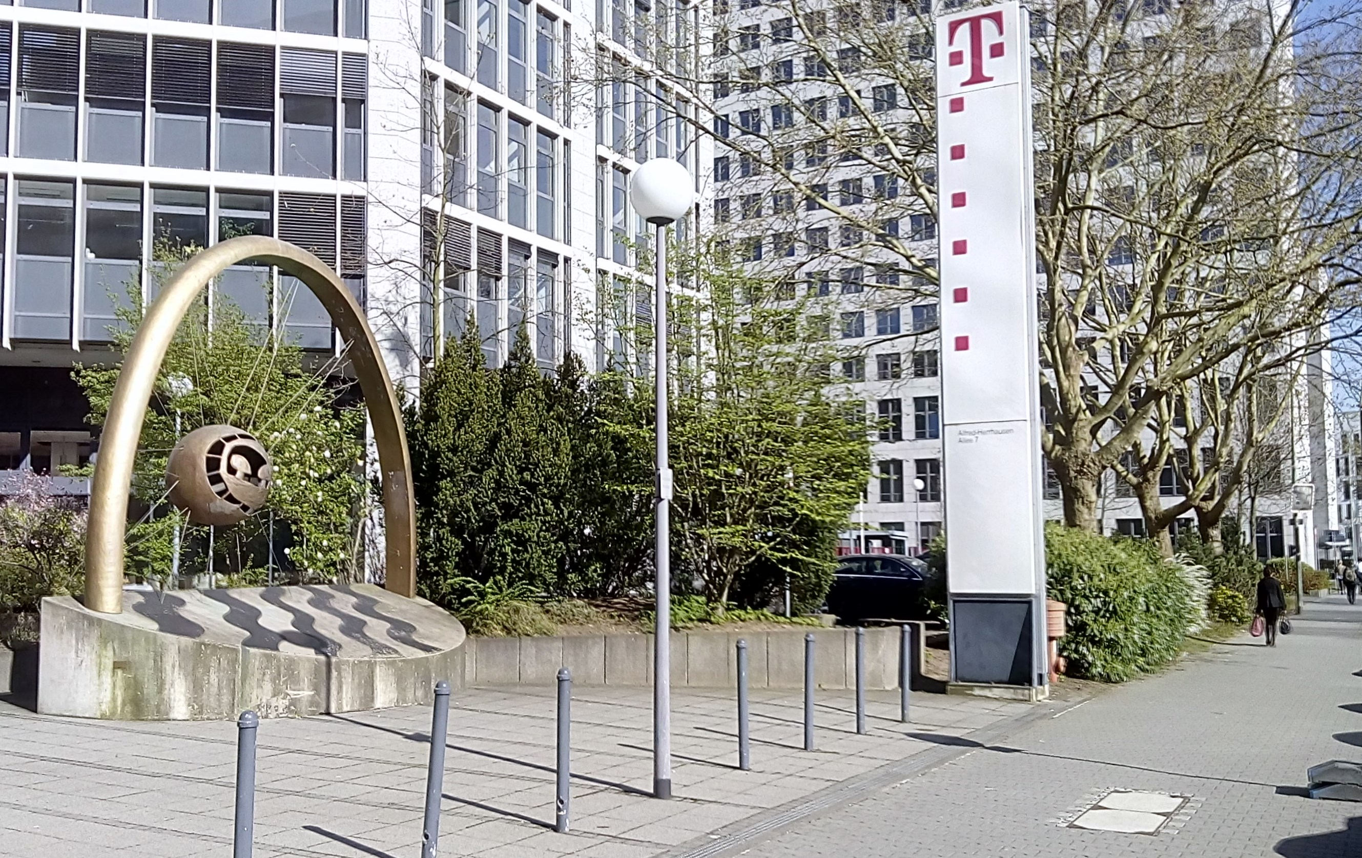 Focus I, Telekom Eschborn, 1992, 480 x 400 x 100 cm, Bronzeplastik von Leonard Lorenz Standort: Alfred-Herrhausen Allee 7, Eschborn